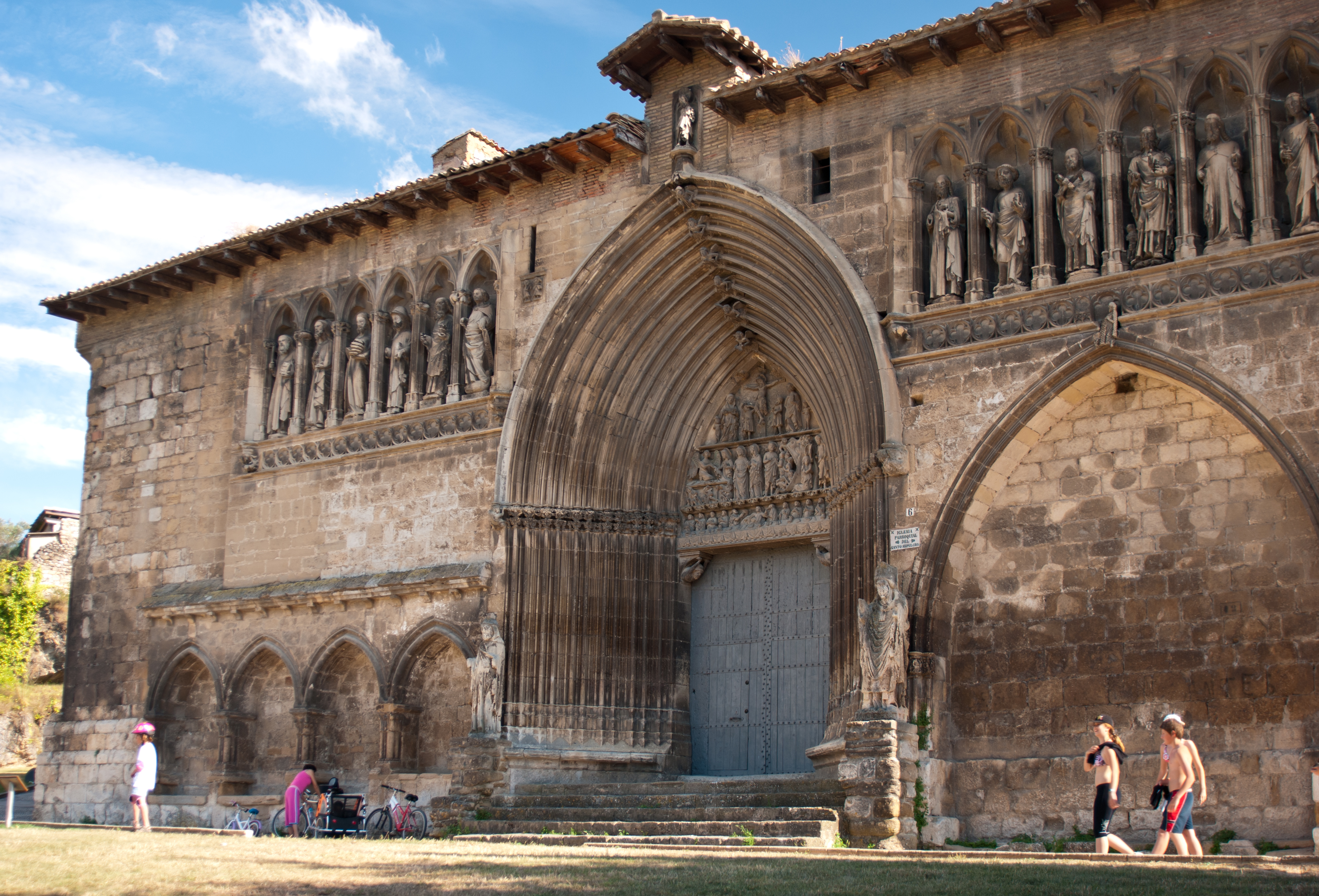 Iglesia del Santo Sepulcro de Estella